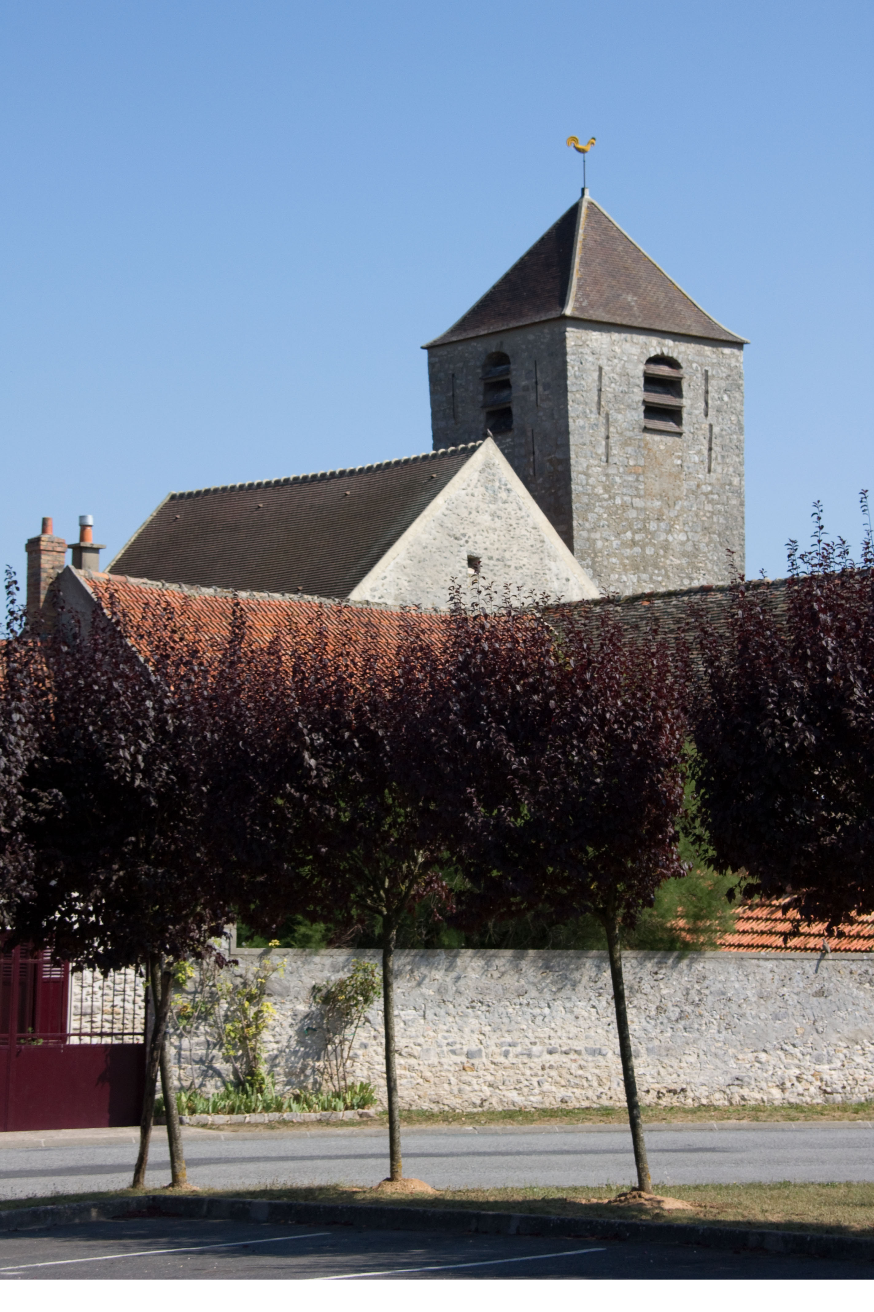 Mairie de Courdimanche-sur-Essonne, Courdimanche-sur-Essonne, Essonne, France